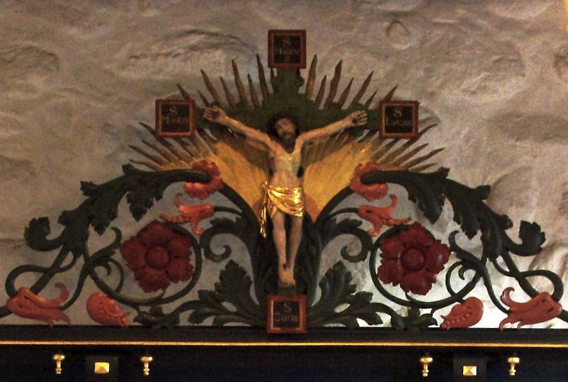 Mittelalterliches Kreuz über dem Altar der St.-Annen-Kirche in Taarstedt